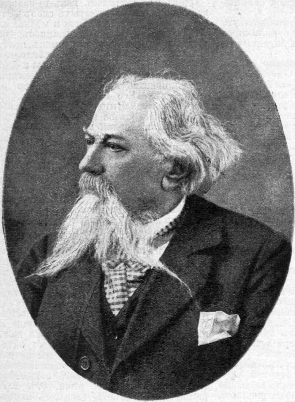 Жемчужников, Алексей Михайлович